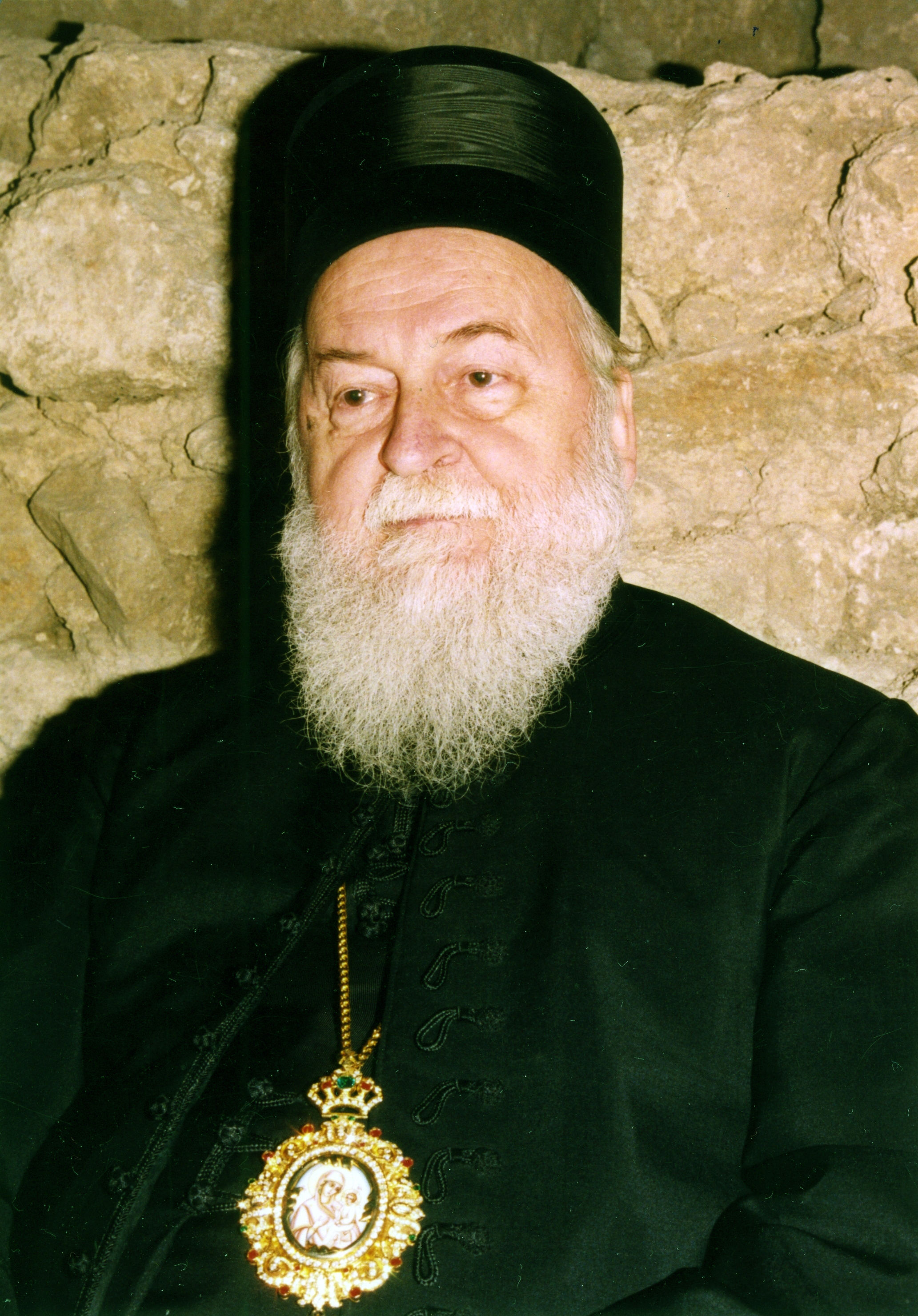 Епископ Шумадийский Савва в старости